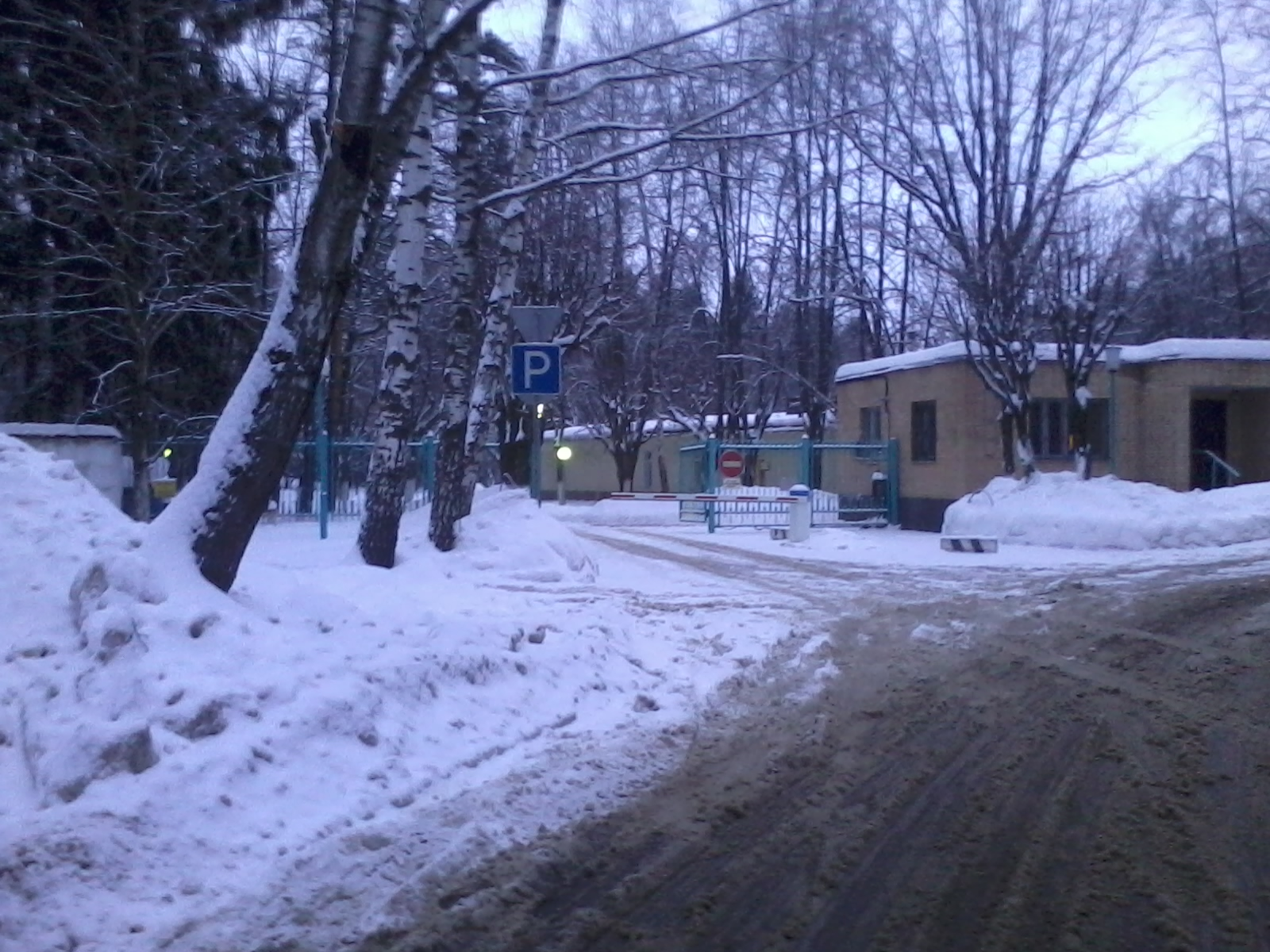 Госпиталь им. Мандрыка, г. Королёв Московской области